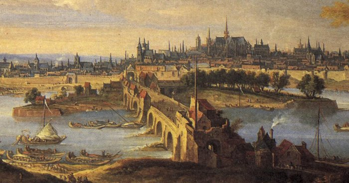 Pont des Tourelles à Orléans, détail d'une vue panoramique depuis la rive sud